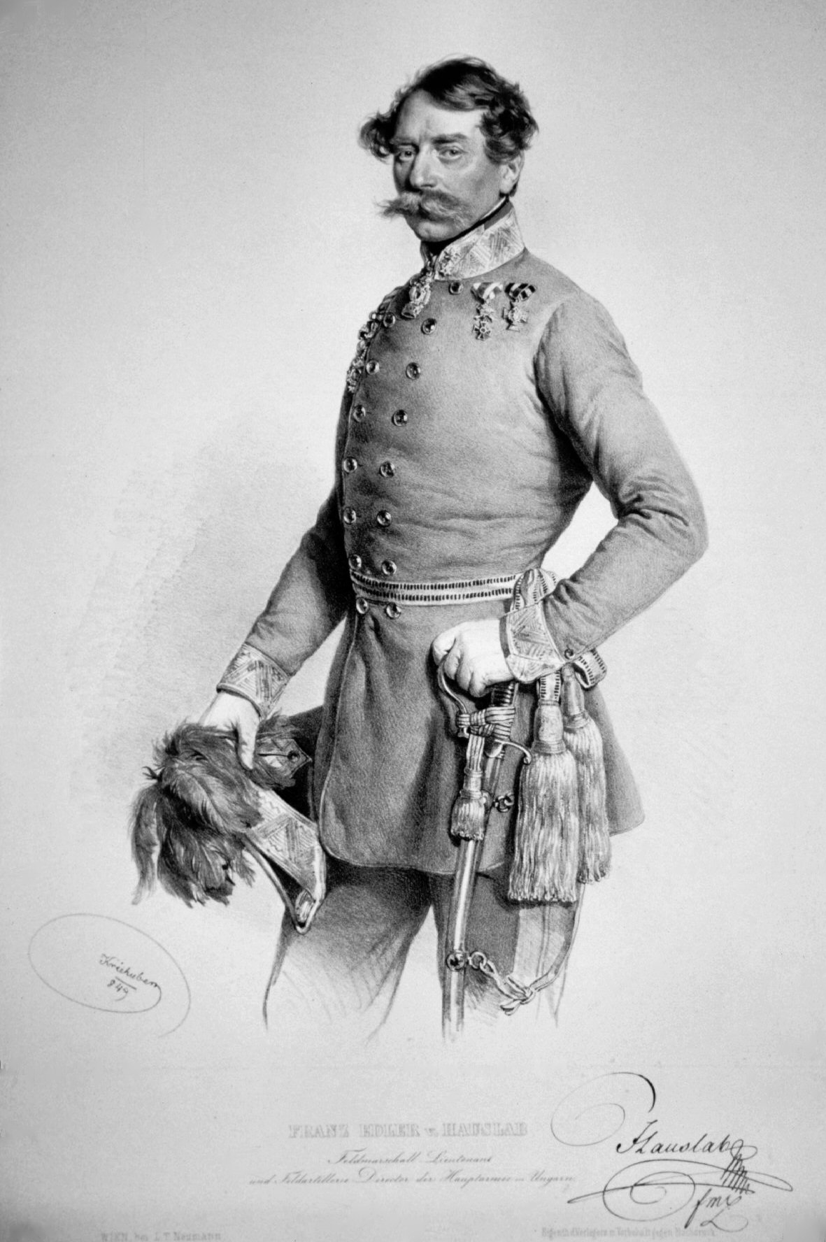 Franz von Hauslab (1798-1883), Feldzeugmeister, Kartograph Lithographie von Josef Kriehuber, 1849